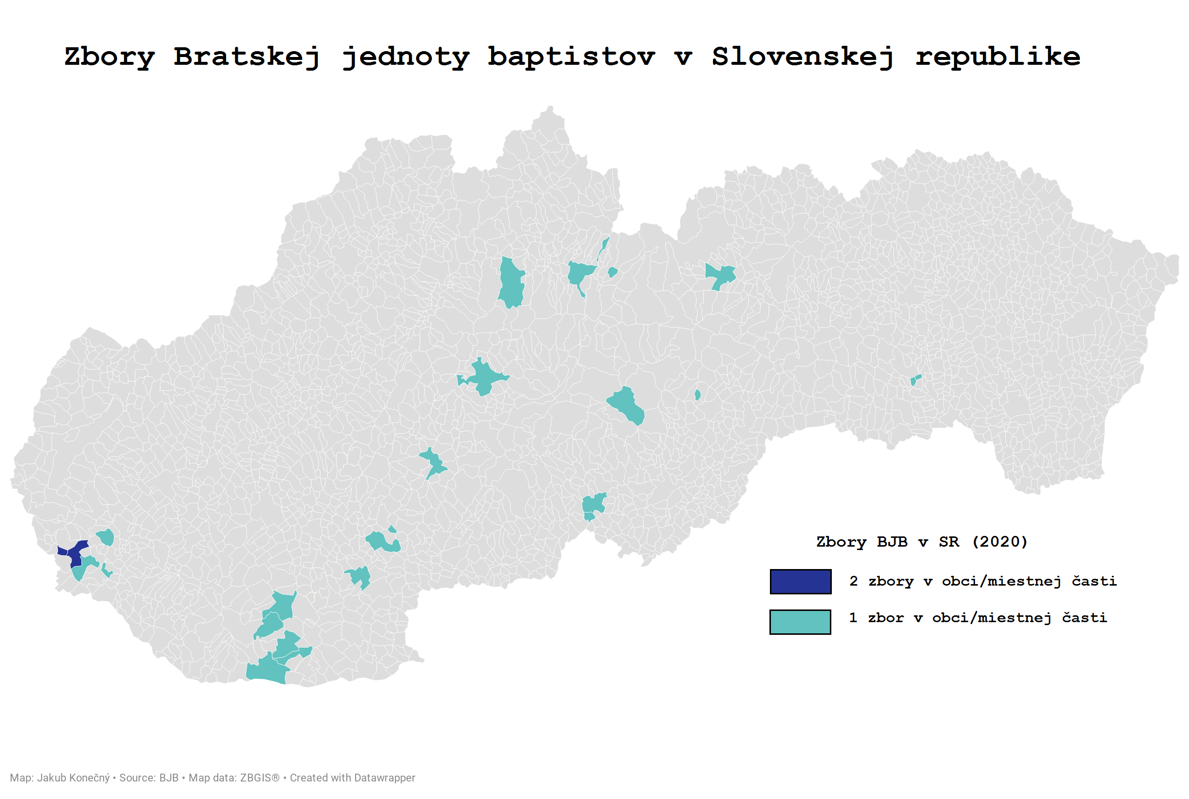 Obce, v ktorých sa nachádzajú zbory Bratskej jednoty baptistov v Slovenskej republike